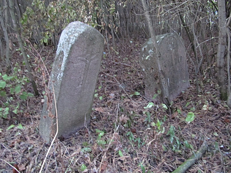 Мархачоўшчына. Могілкі